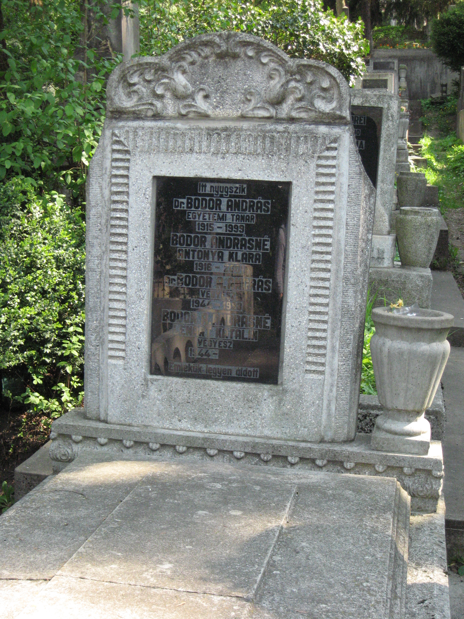 Bodor András sírja a kolozsvári Házsongárdi temetőben.